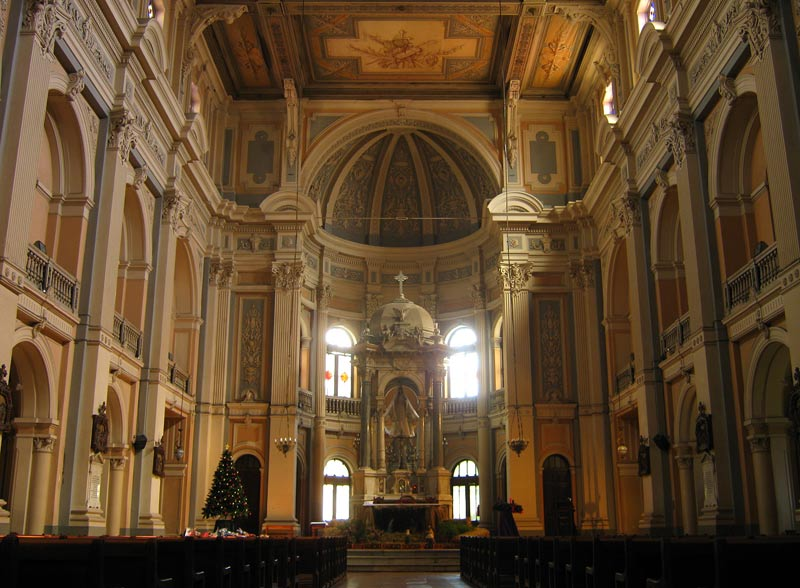 Nave central de la Iglesia